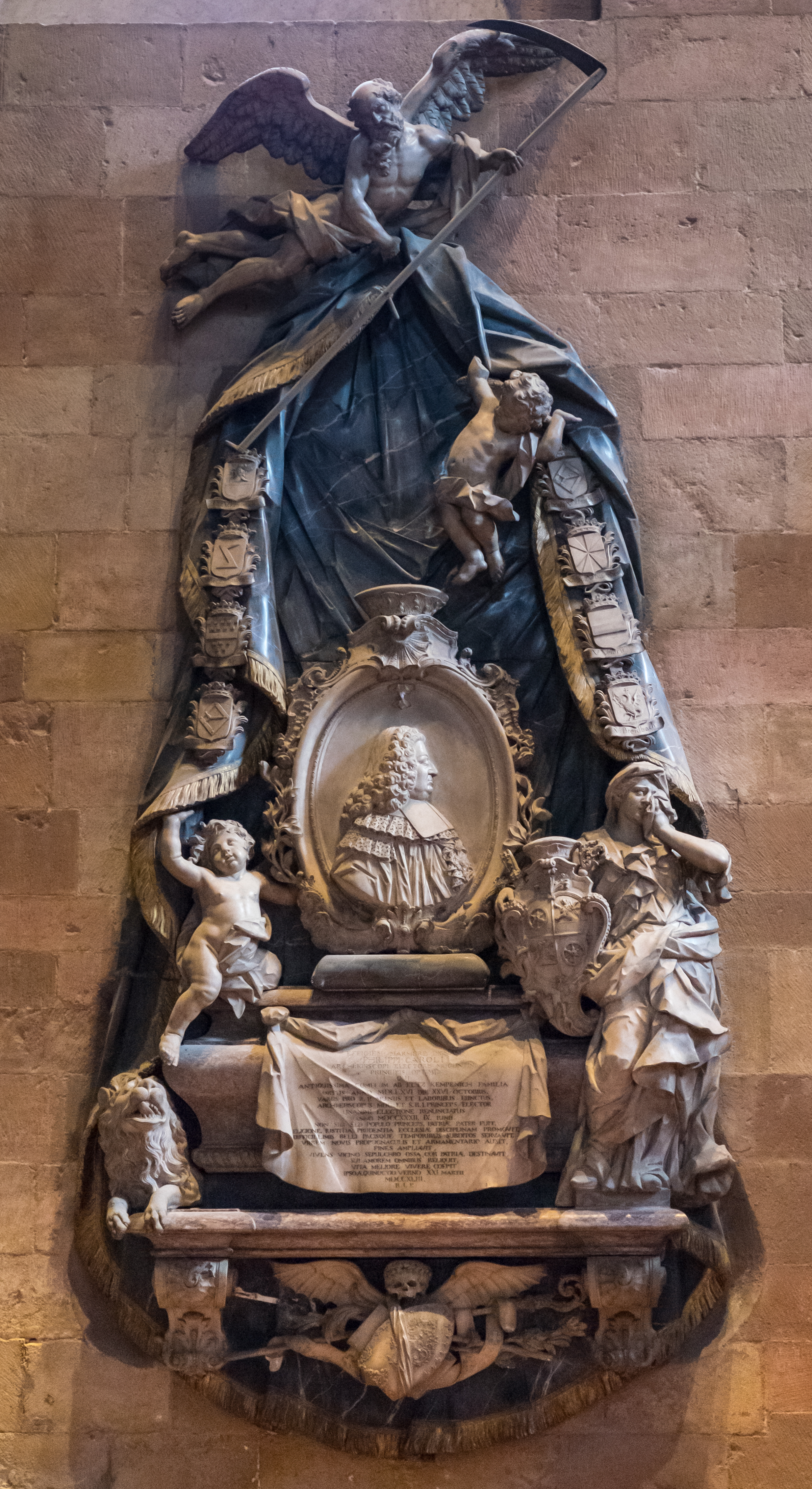 Grabmal von Philipp Karl von Eltz-Kempenich im Mainzer Dom, Bildhauer: Burkard Zamels